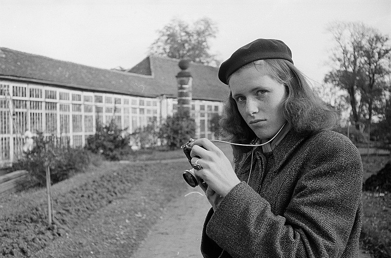 Original image description from the Deutsche Fotothek Renate Rössing mit Kamera vor der Gärtnerei der Orangerie des Schlosses Belvedere